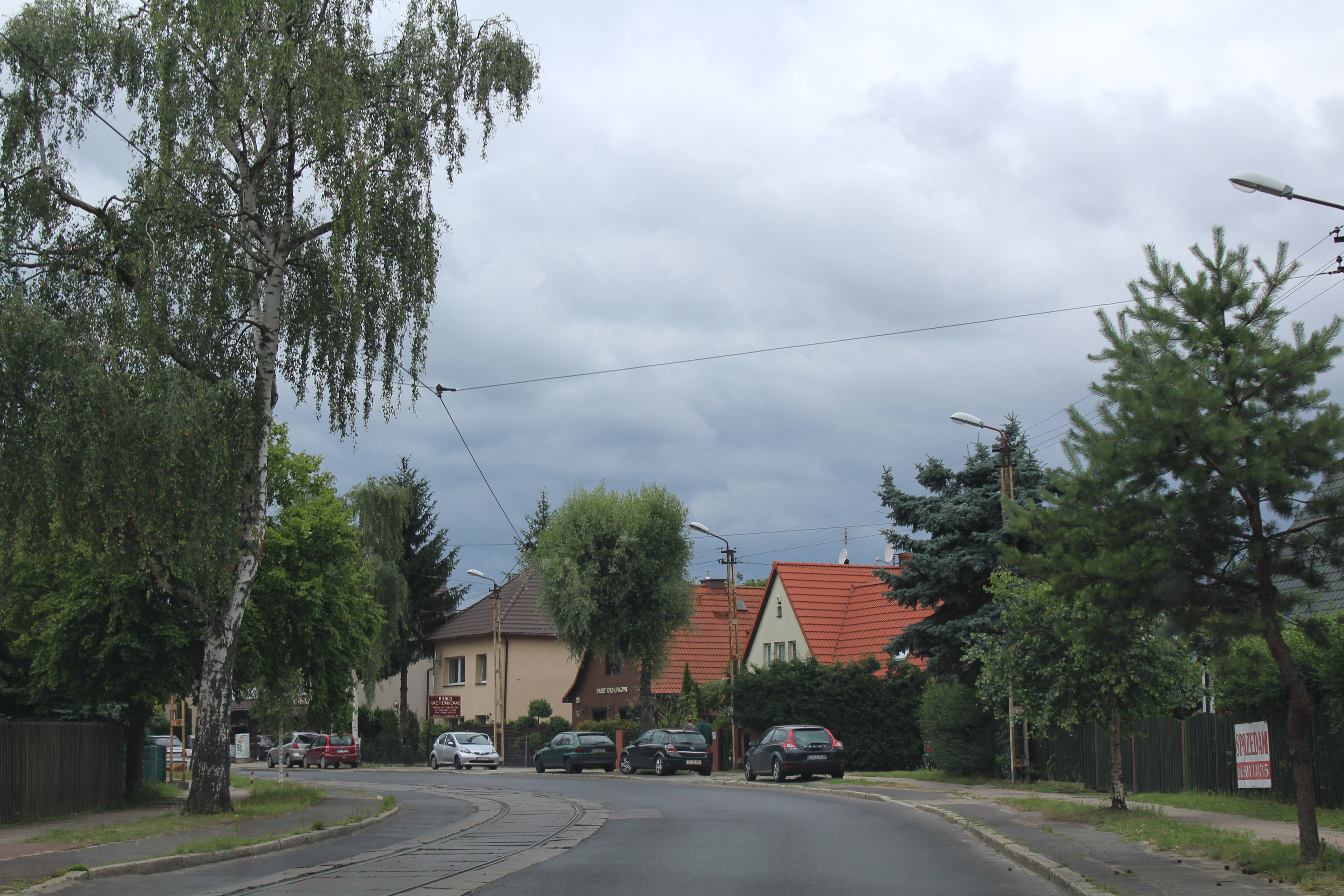 Ulica Leopolda Okulickiego w Szczecinie